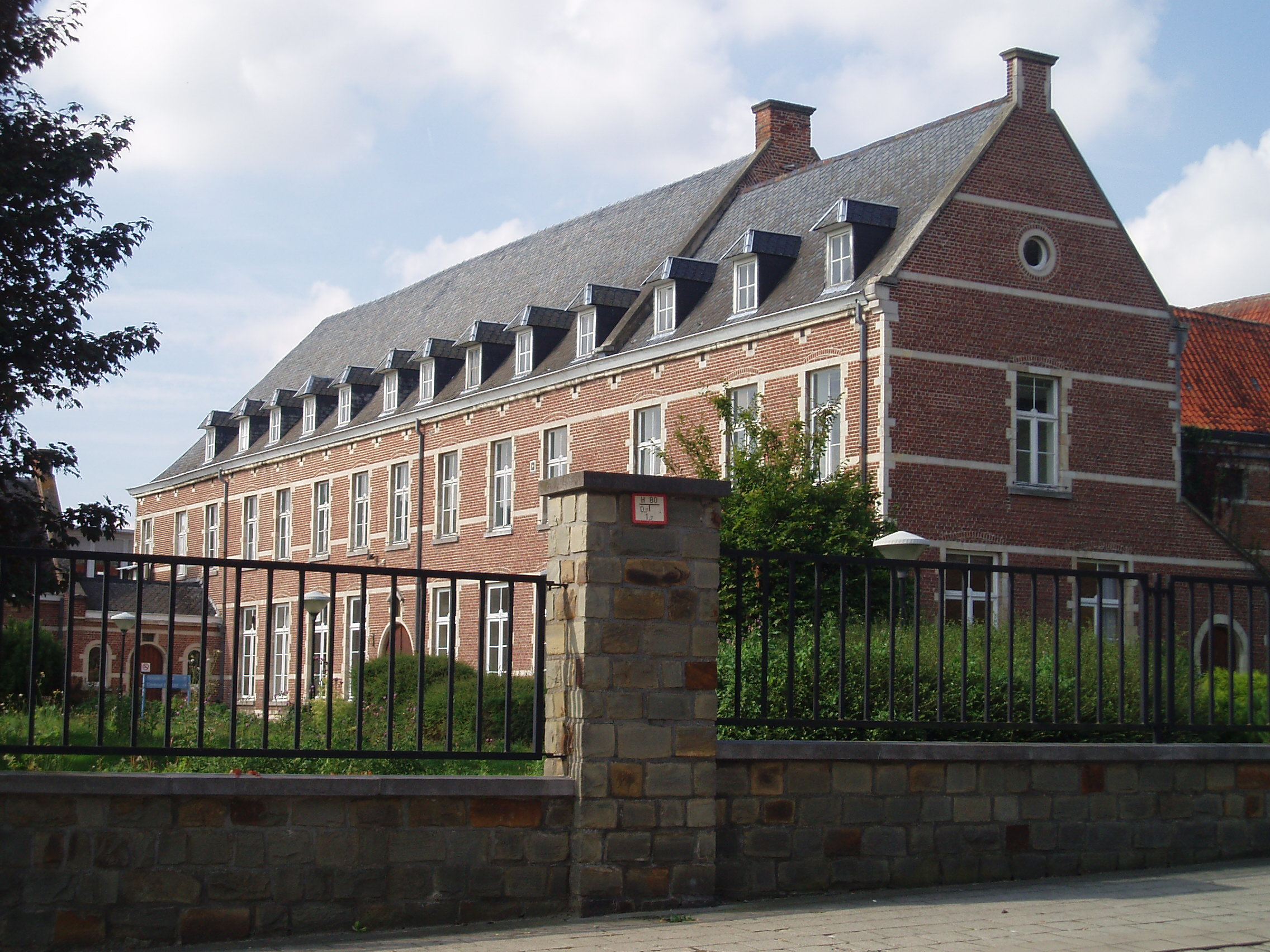 Klooster van de Annunciaten Veldbornstraat Tienen